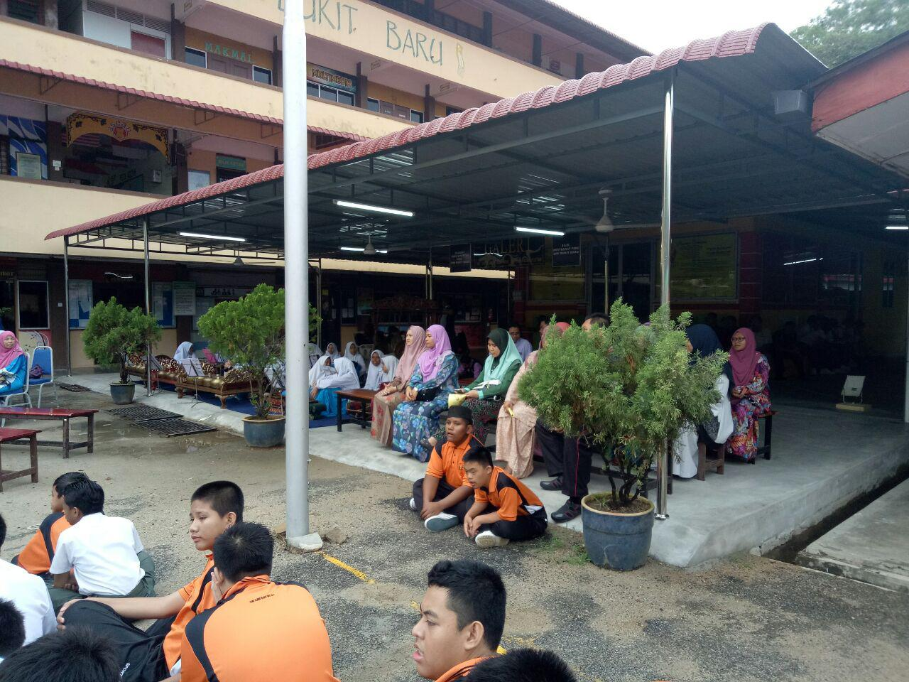 Kawasan Baru tempat duduk guru